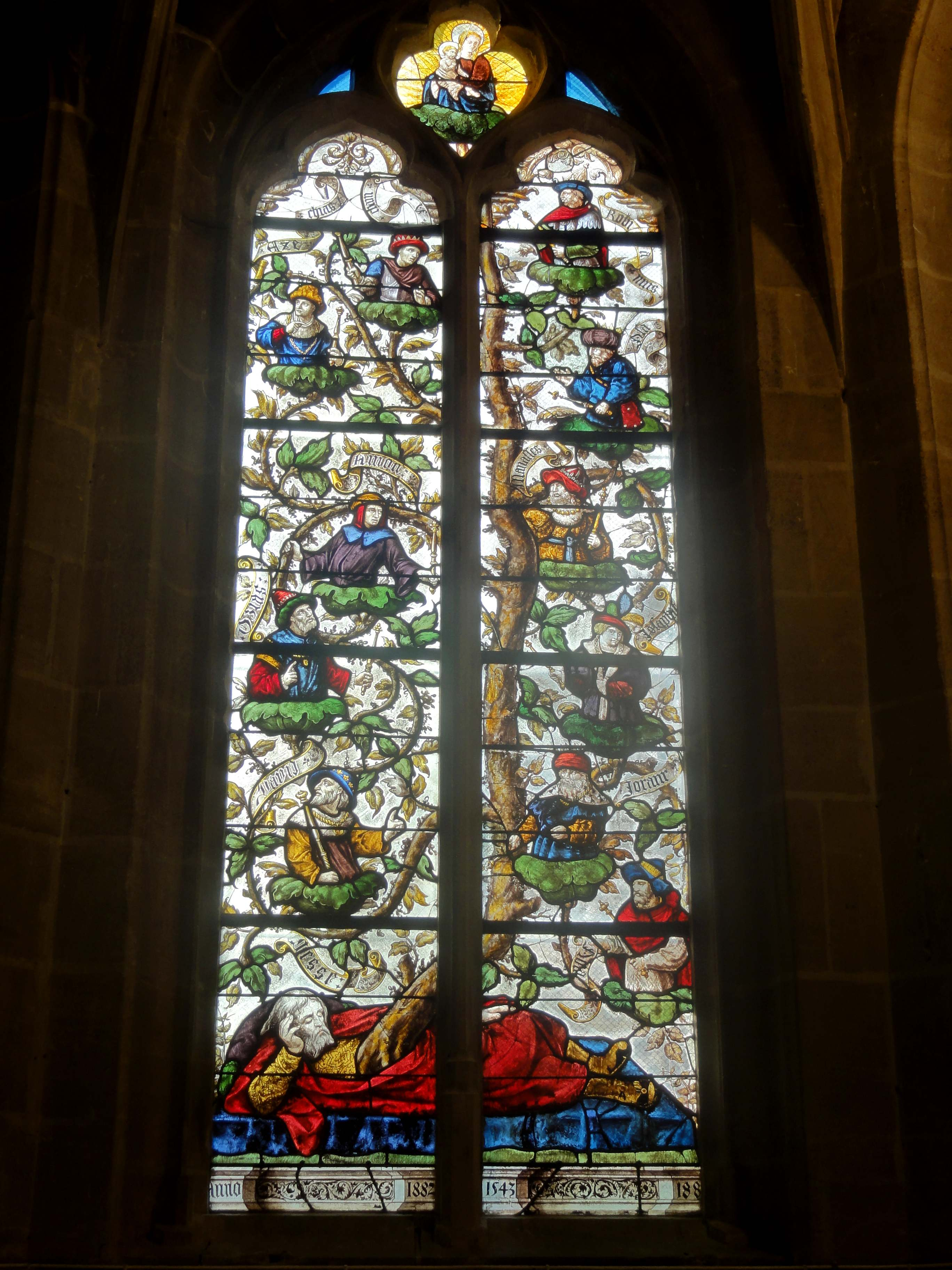 Verrière n° 2 - arbre de Jessé 1.